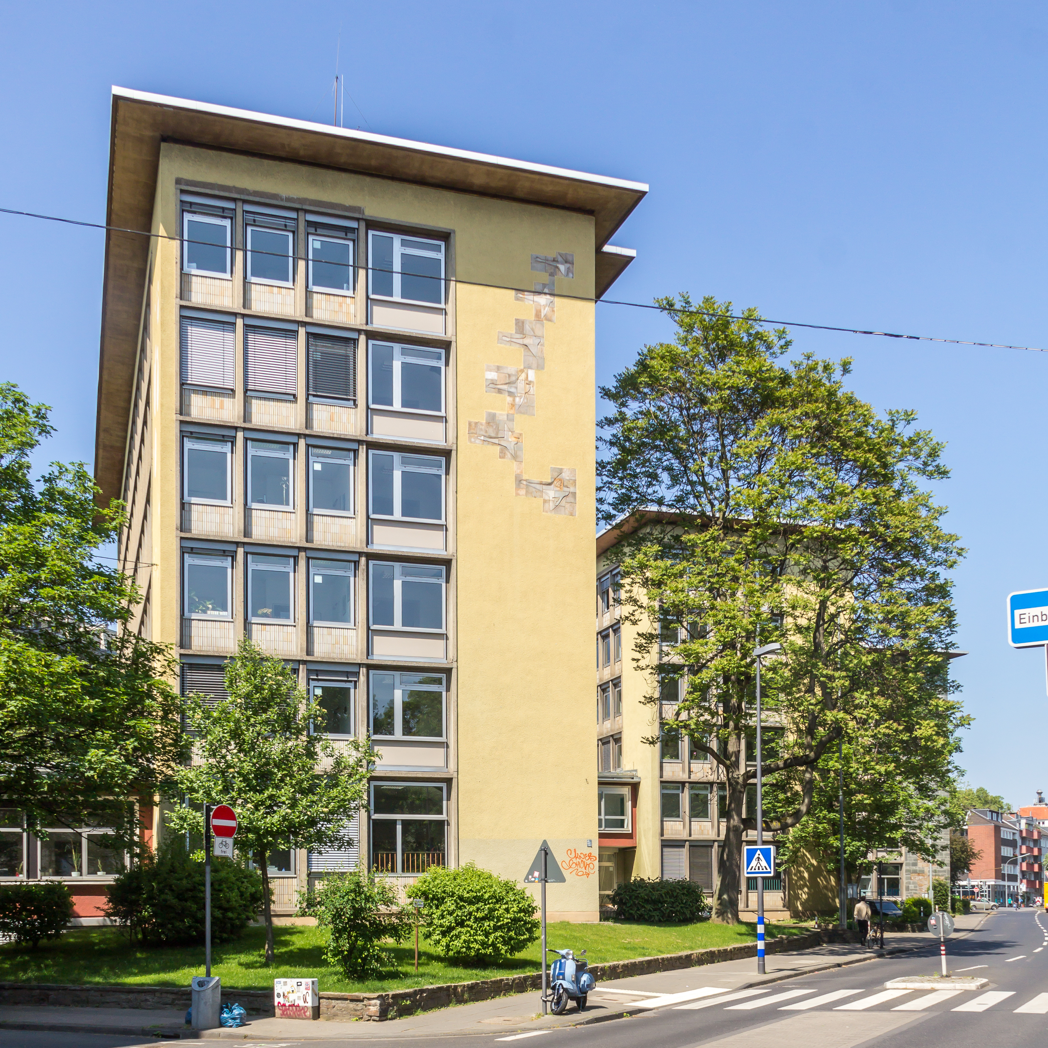 Finanzamt Köln-Süd, Haus A, Stirnseite mit Relief: Vögel